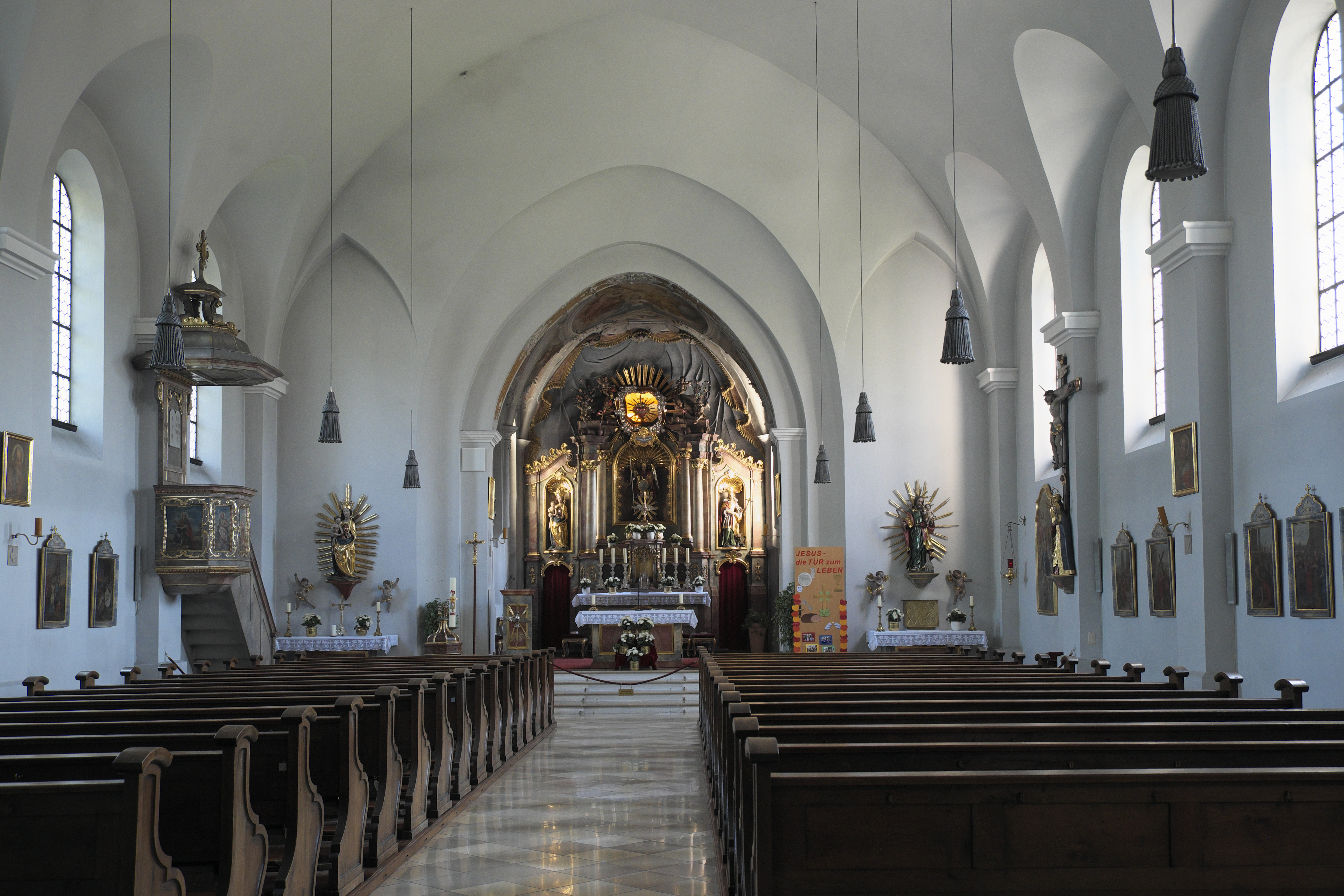 Katholische Pfarrkirche St. Michael in Lochhausen im Stadtbezirk Aubing-Lochhausen-Langwied in München (Bayern/Deutschland), Innenraum